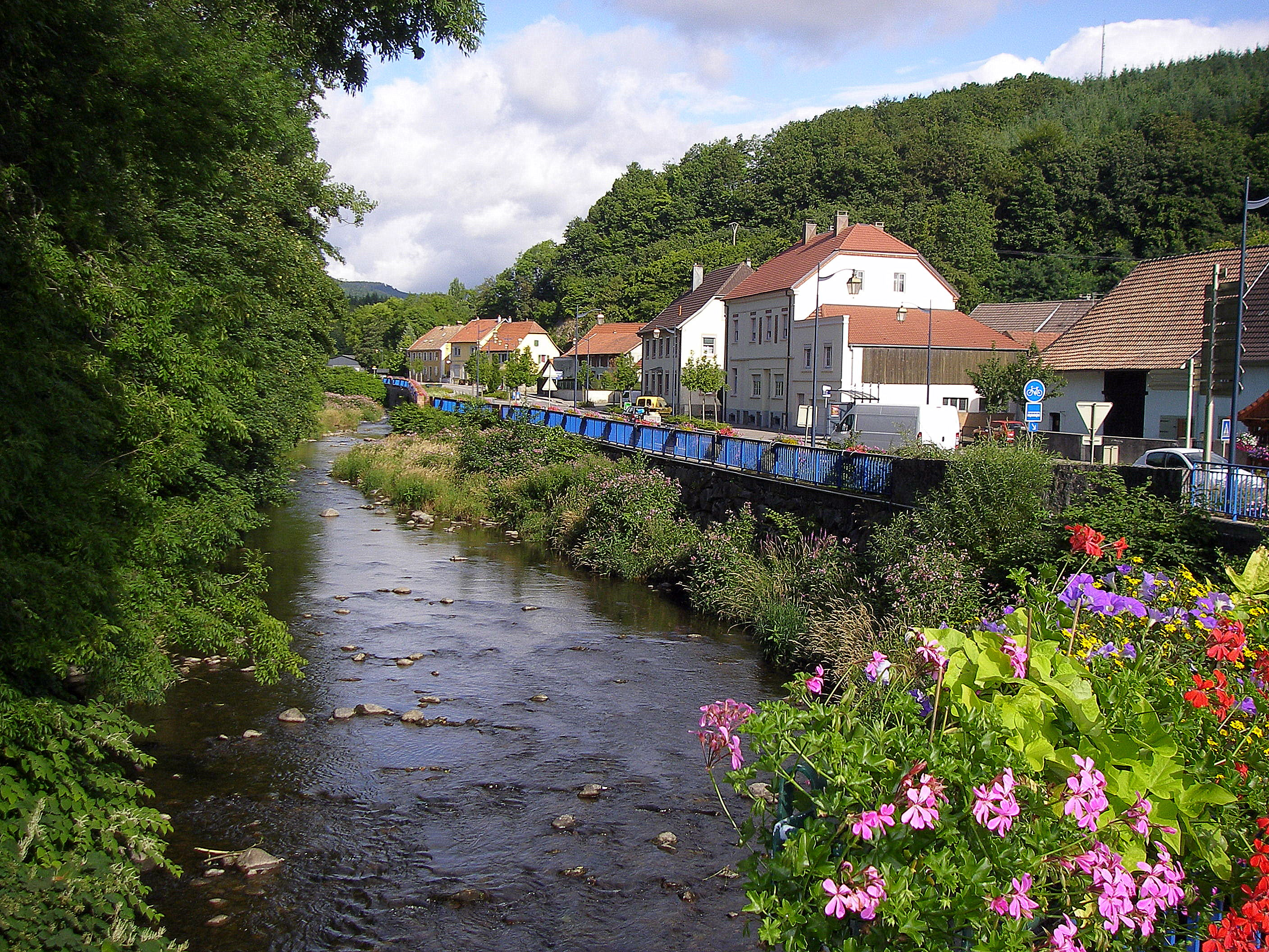 La Doller à Lauw (Haut-Rhin, France)